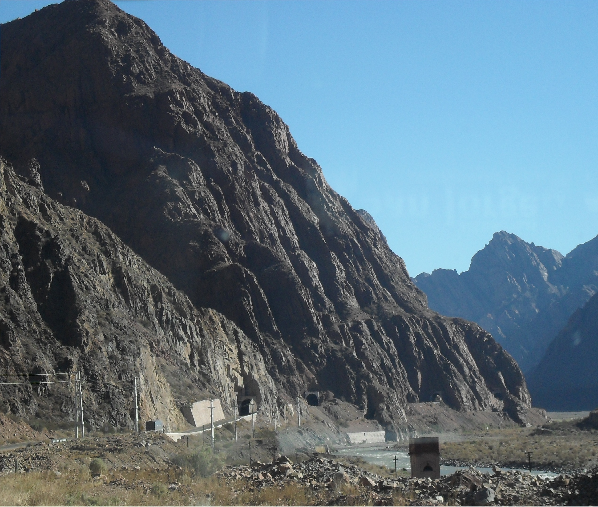 Puentes en la ruta 7, Mendoza